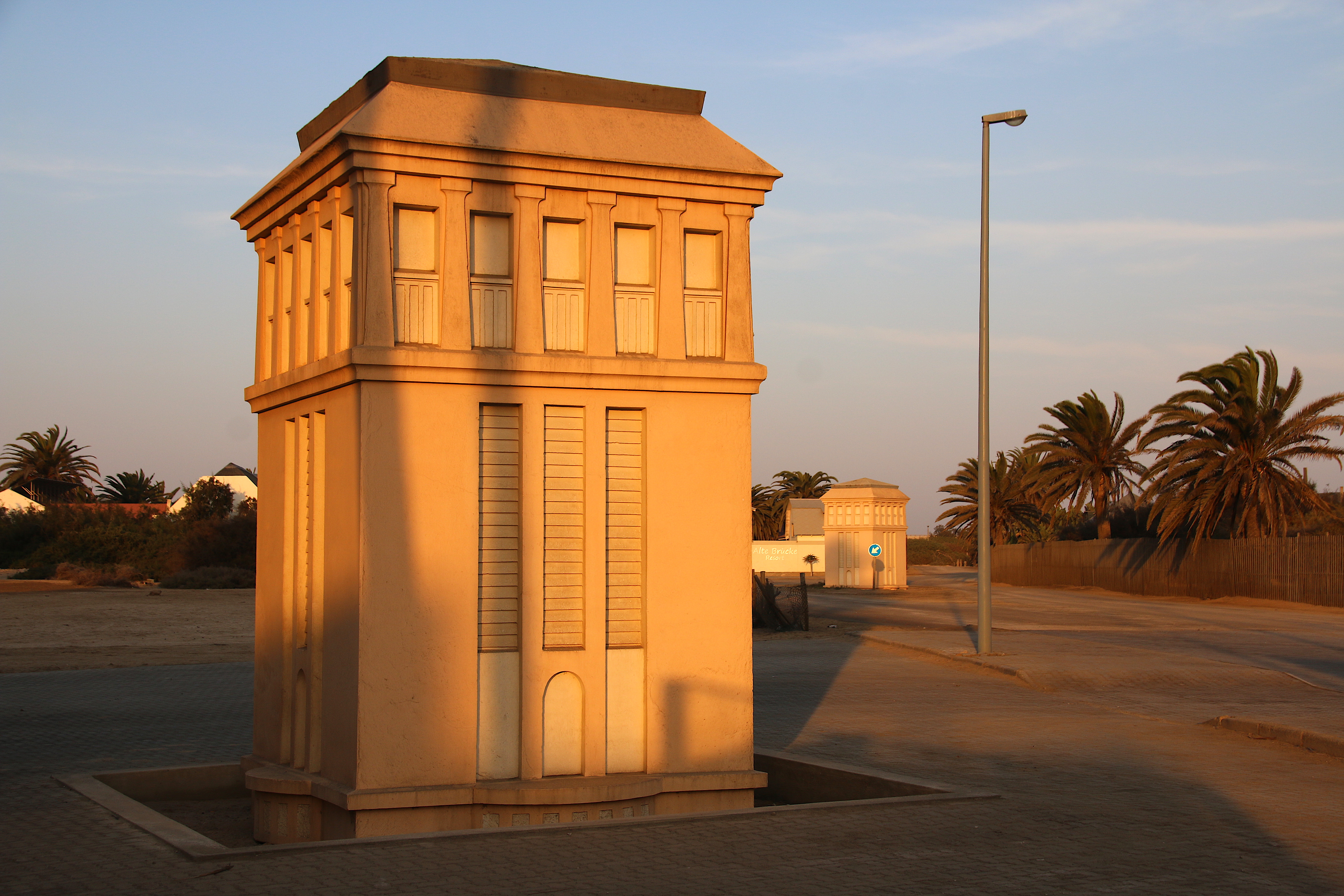 Zwei Ankerpunkte eines Sendemasts in Swakopmund Deutsch-Südwestafrika